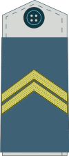 Serbian military ranks and insignia